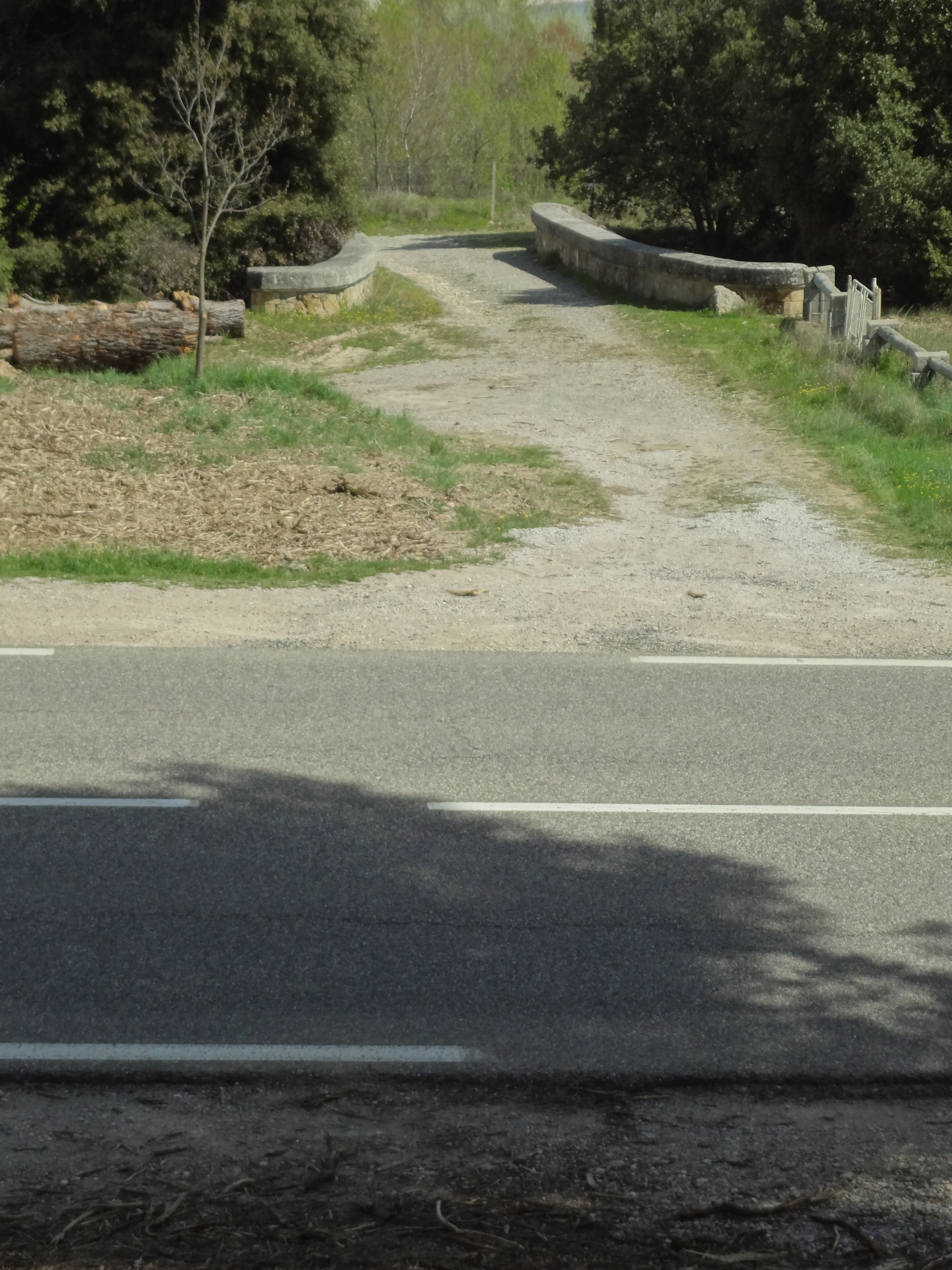 Un des éléments encore visible de l’affaire Dominici : le pont de chemin de fer par où s’est enfui la petite Elisabeth Drummond